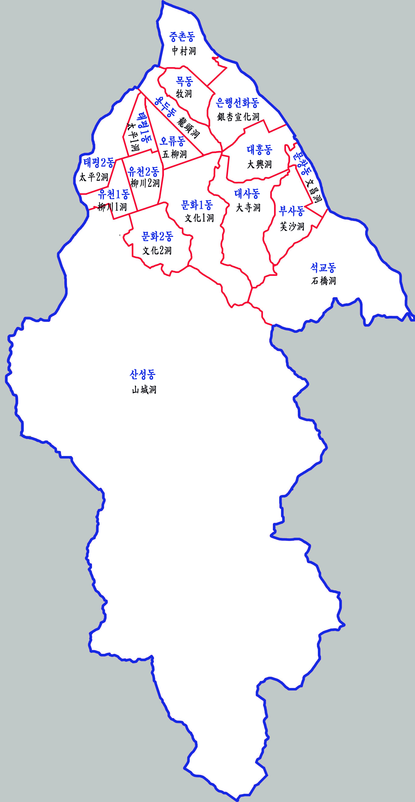 대전시 중구 행정구역도